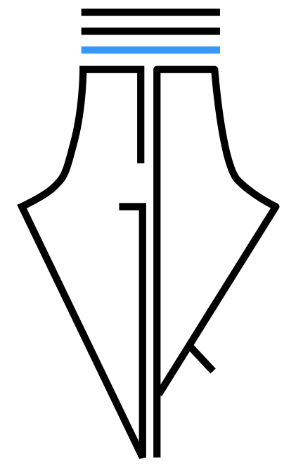 Logo creado para la revista Granite & Rainbow por la diseñadora e ilustradora Inge Conde.